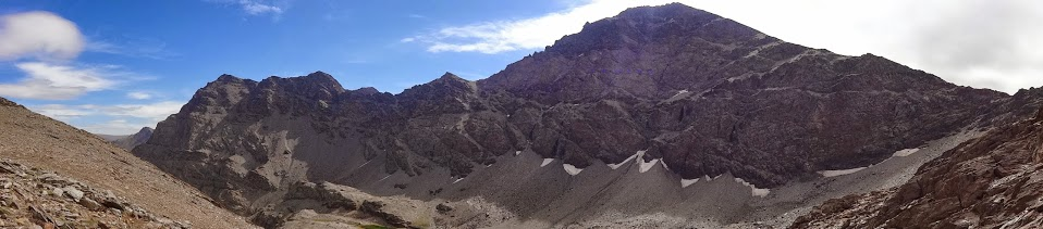 Mulhacen (der) y Alcazaba (izq) por su cara norte